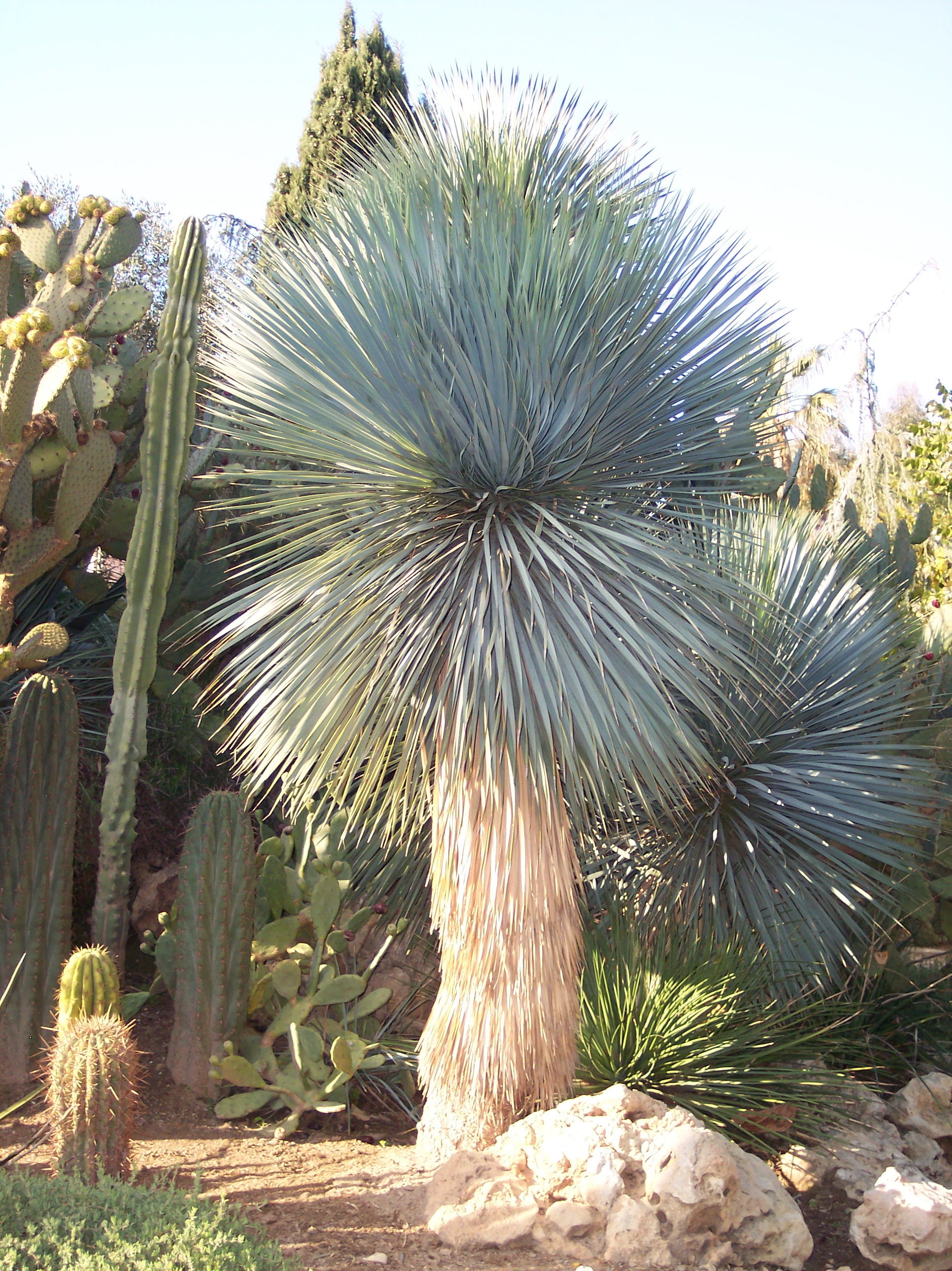 Yucca rostrata : spécimen mature au Jardin Olbius Riquier à Hyères (France)